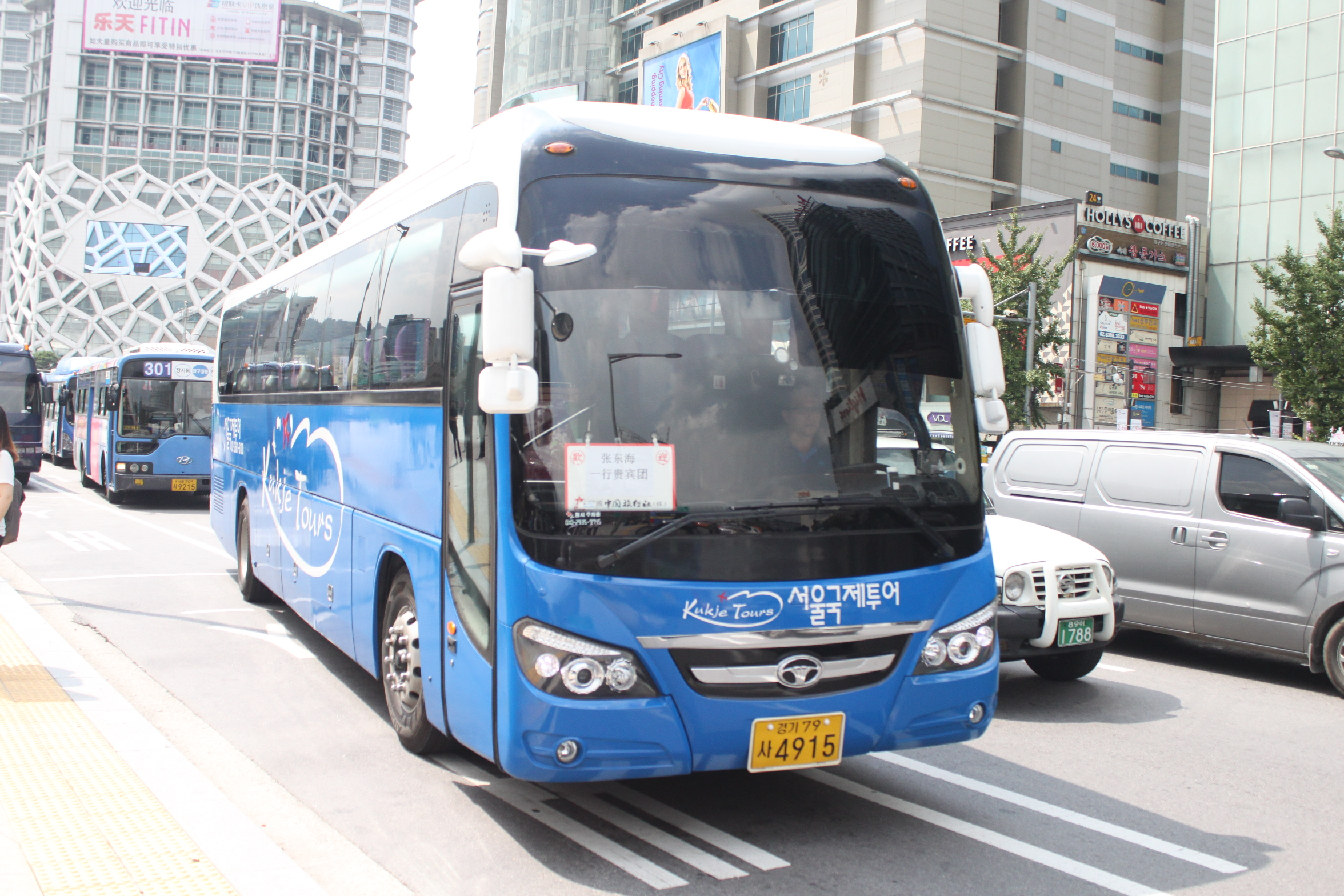 관광버스로 운행 중인 대우 FX